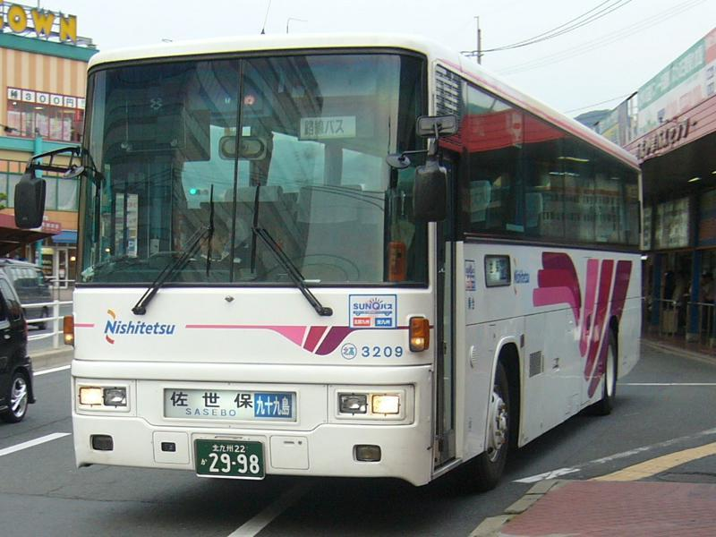 登録番号 北九州22か29-98 西日本鉄道所属 車番3209 九十九島号用 2006年5月8日 砂津バス停留所にて撮影